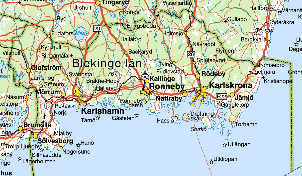 Karta över Blekinge. Hämtad från Lantmäteriets "Sverigekartan", skala 1:1 000 000, juli 2015 (TIFF-format).